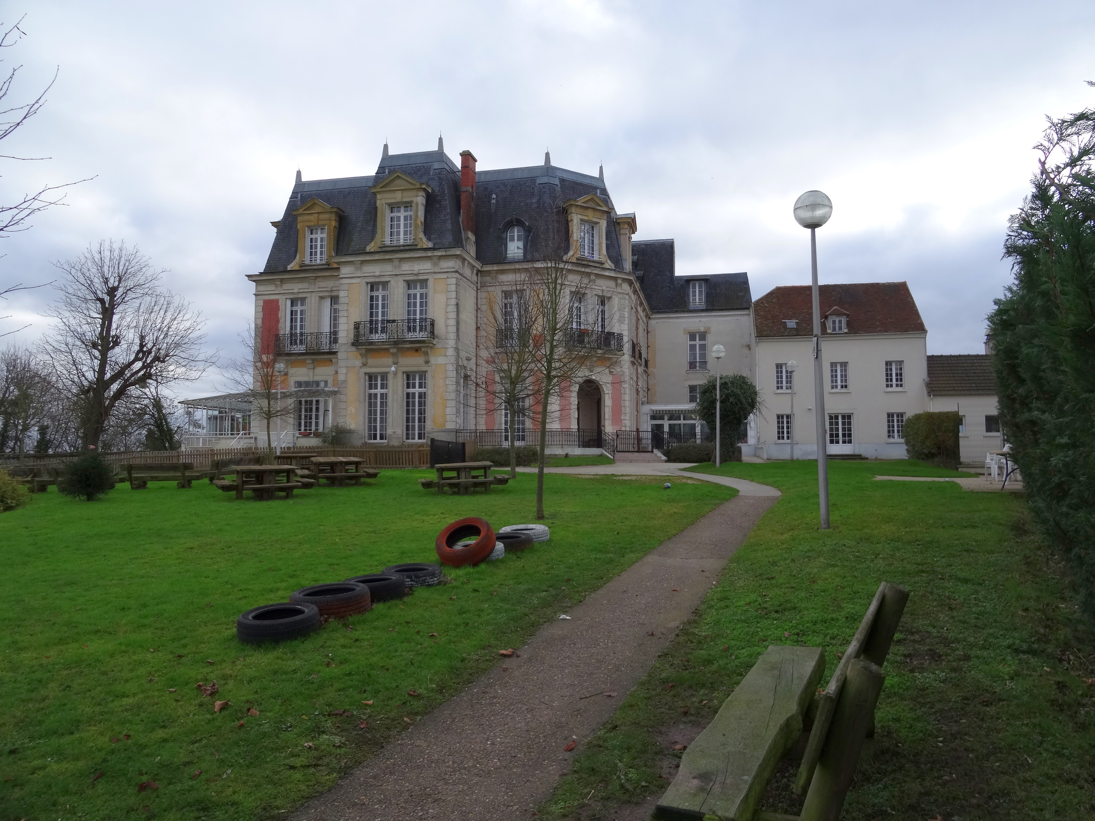 Château de Montigny à Lesches. (Seine-et-Marne, région Île-de-France).